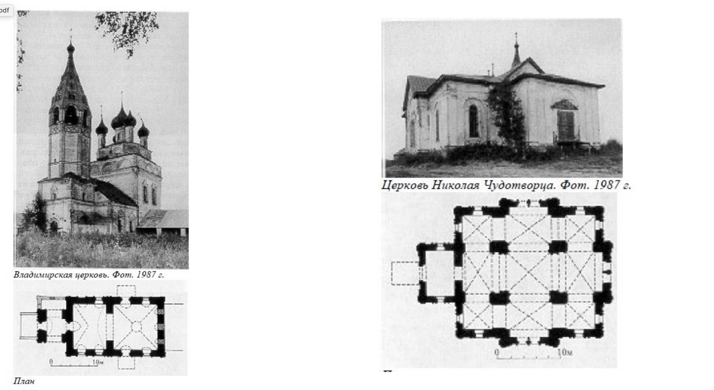 План